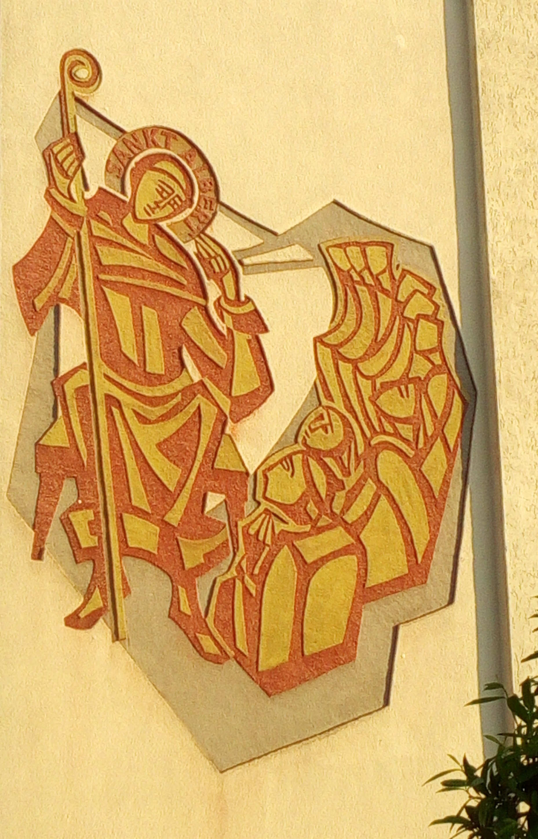 St. Albert, Sgrafitto an der Kirche St. Albert in Frankfurt am Main von Ludwig Becker (1914-1971)